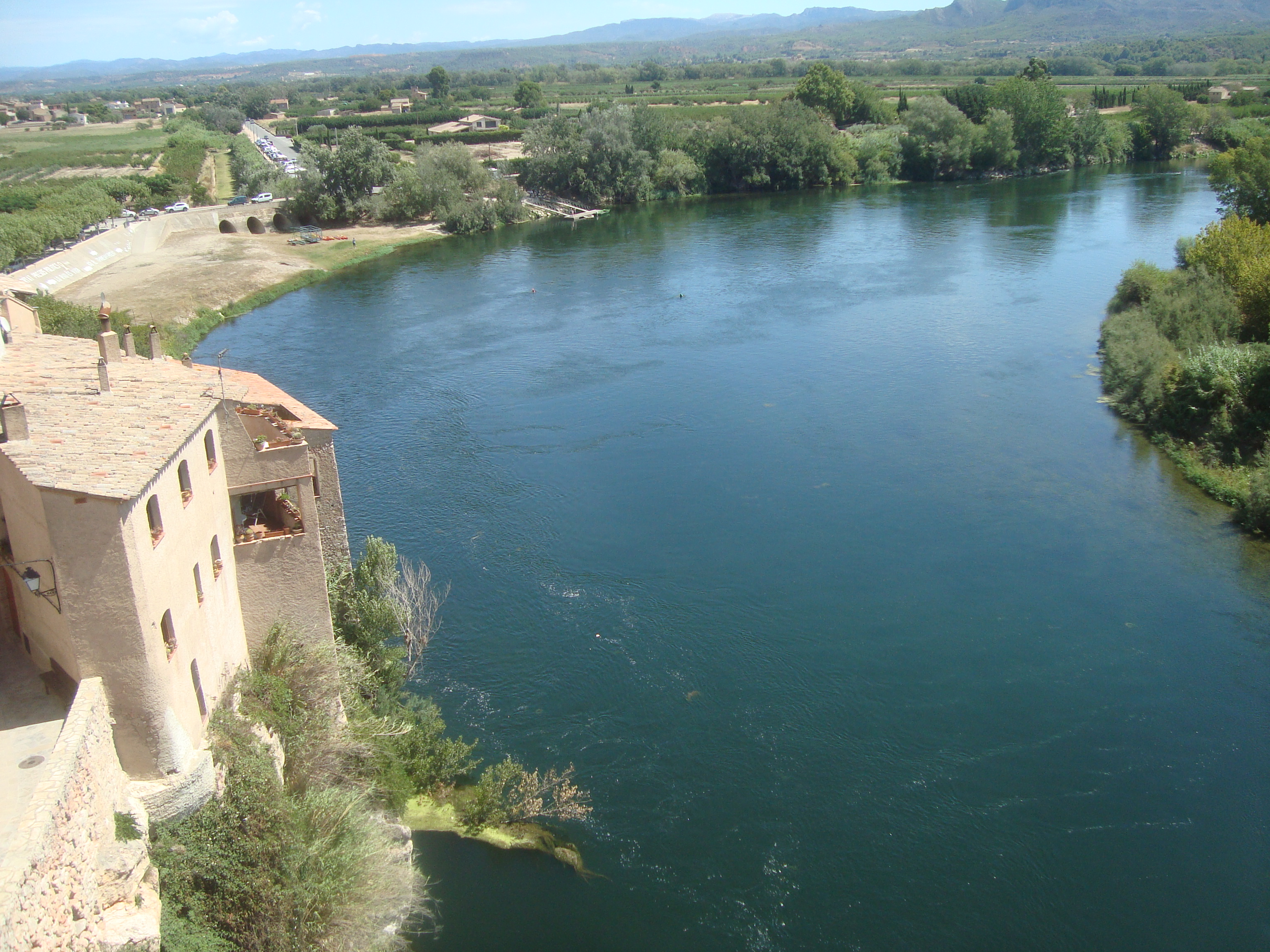 El río Ebro a su paso por Miravet (Ribera d'Ebre, provincia de Tarragona, Cataluña).